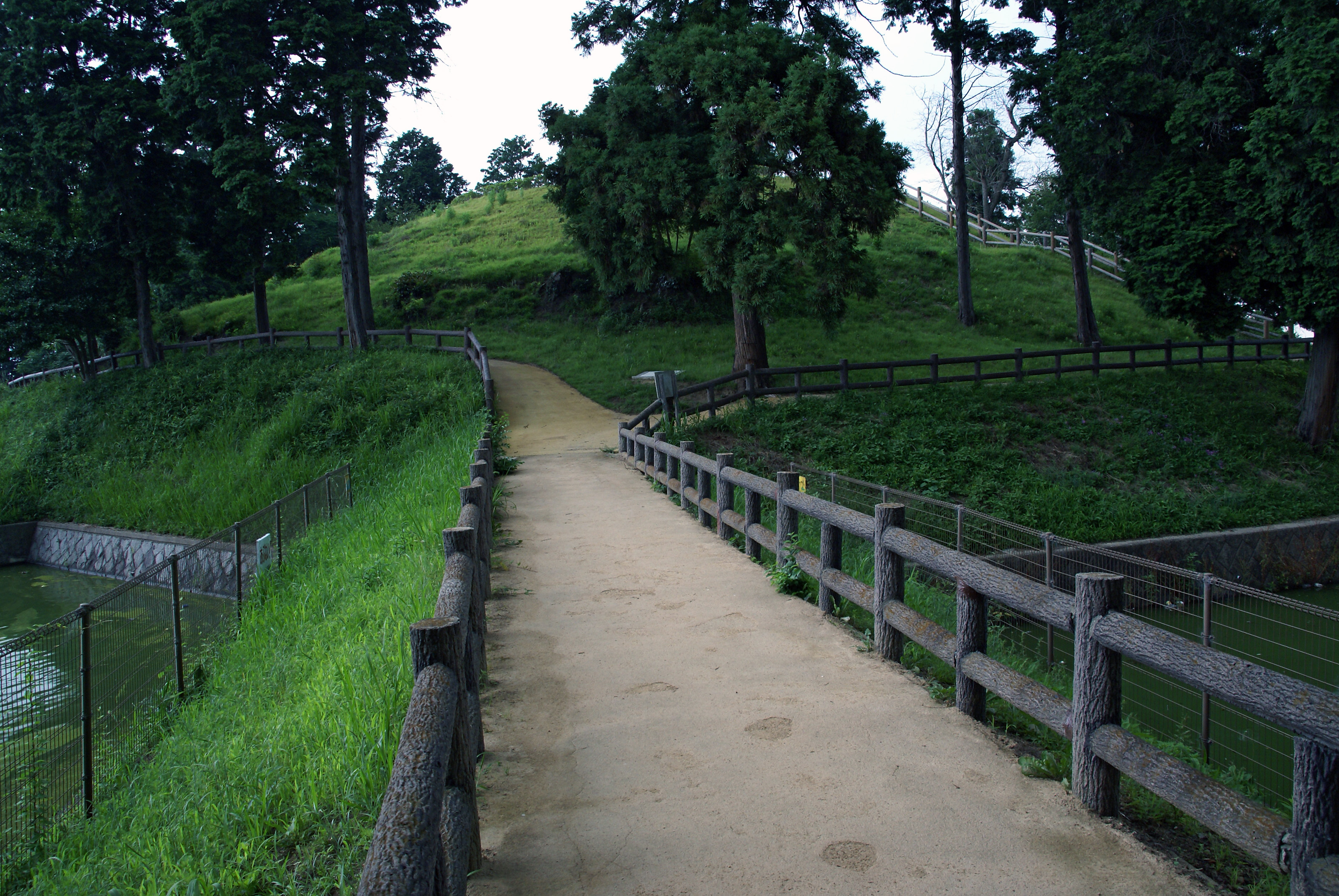 Kuroduka-kofun in Tenri, Nara, Japan